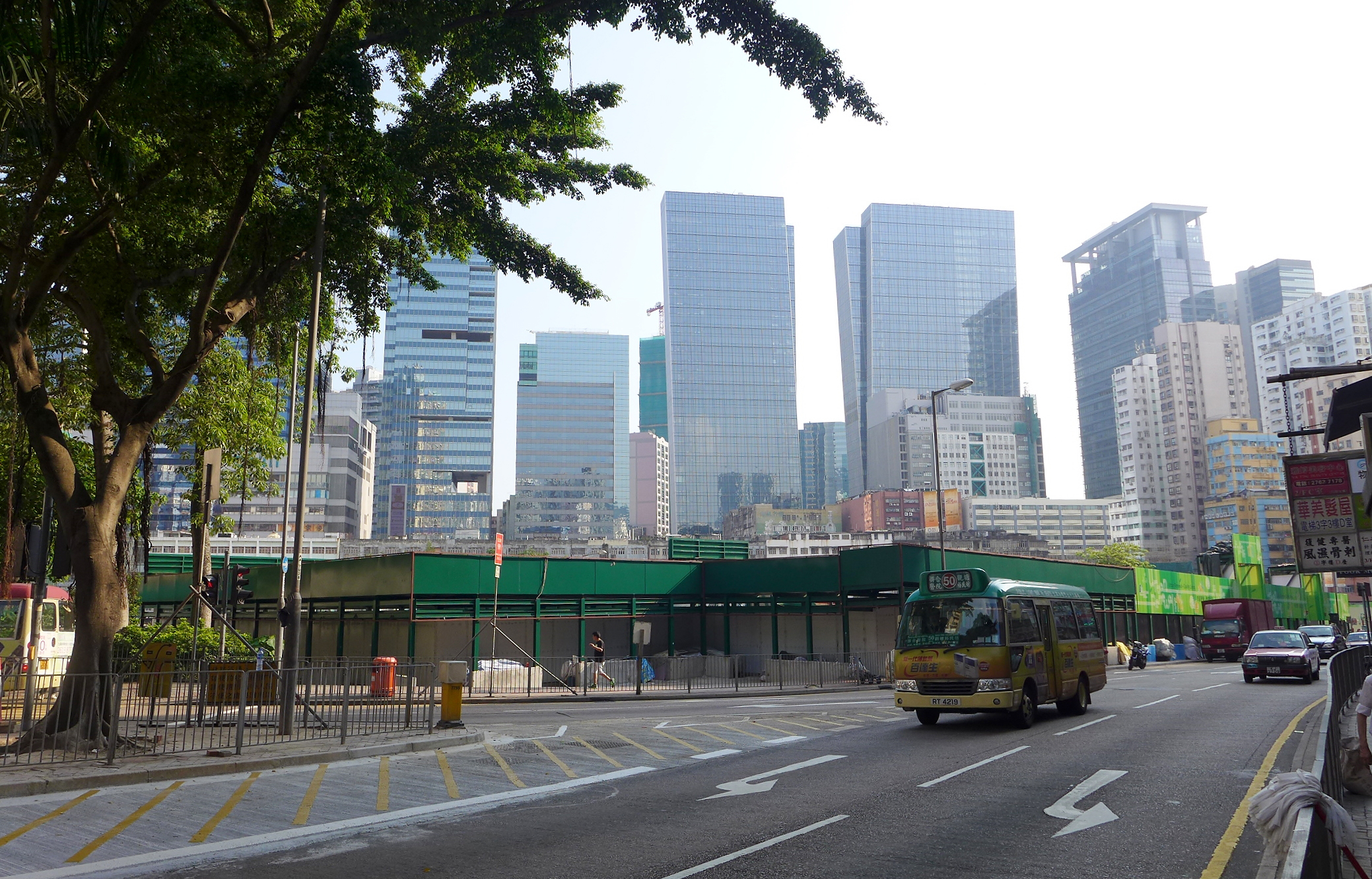 Mut Wah Street, 2014